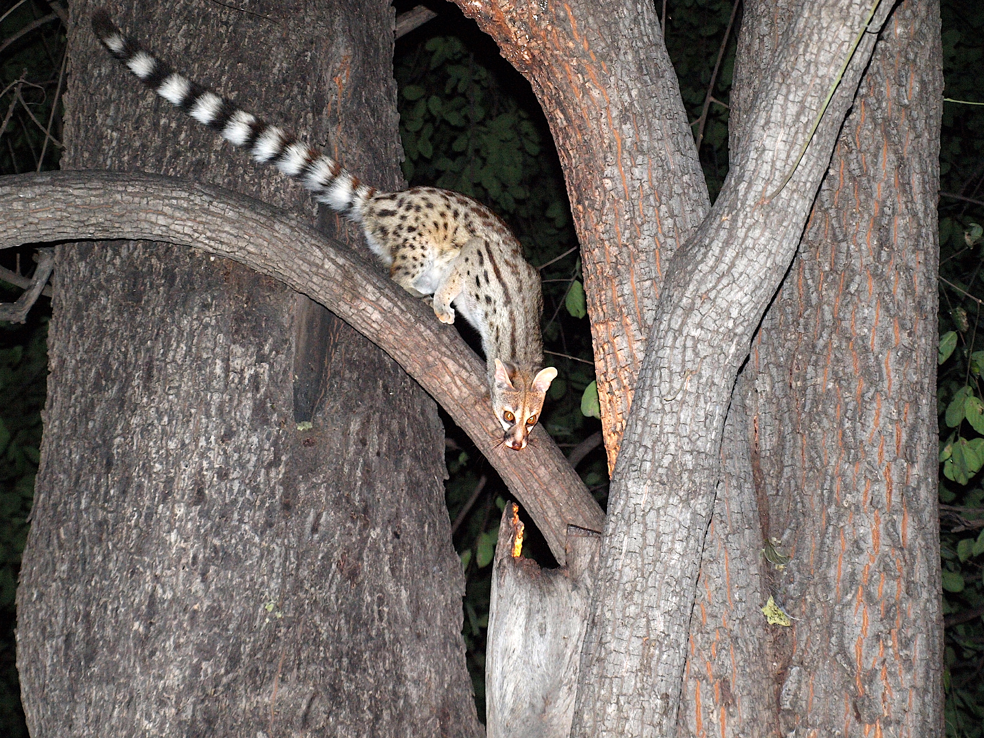 Ginsterkatze in Maun